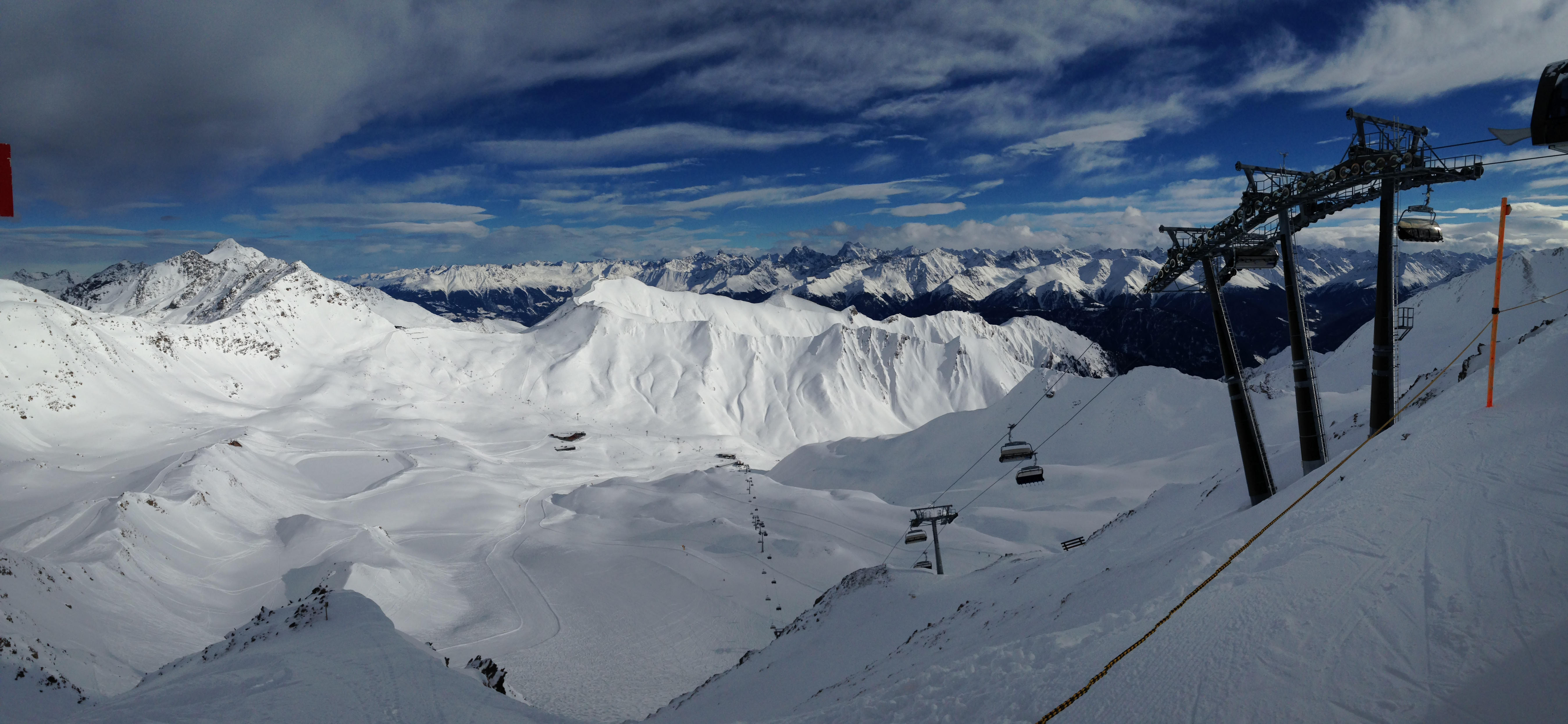 Sicht vom 2828m hohem Masnerkopf in den Masnerkessel. In der Mitte des Bildes erkennt man die Talstationen der Masnerkopfbahn sowie der Arrezjoch. Rechts daneben ist die Masner Ski Hütte zu erkennen.